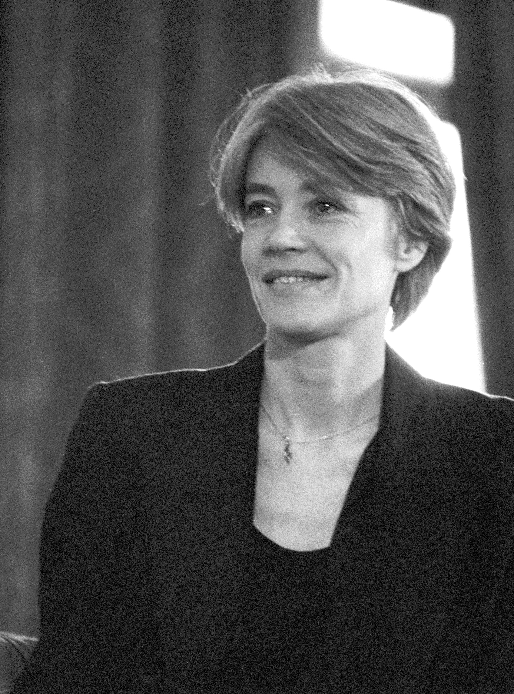 La chanteuse française Françoise Hardy à Deauville (Normandie, France) en juillet 1992.